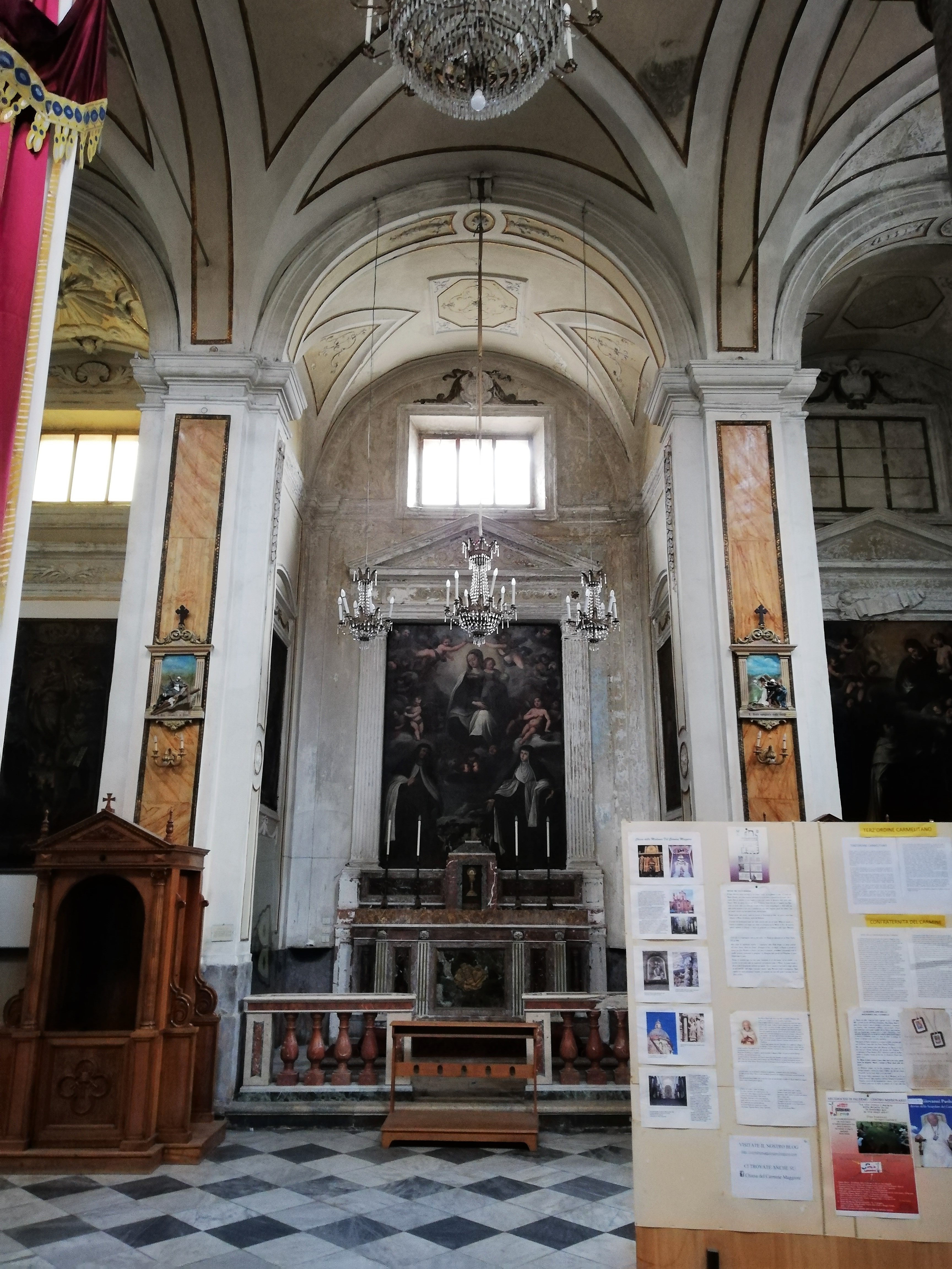 Seconda cappella navata destra.